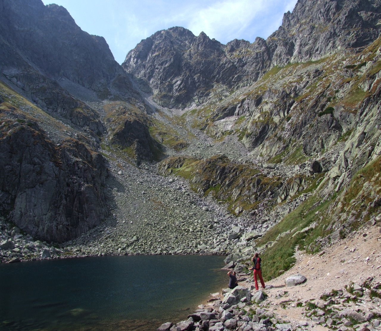 Zmarzły Staw Gąsienicowy. U góry Zawratowa Turnia